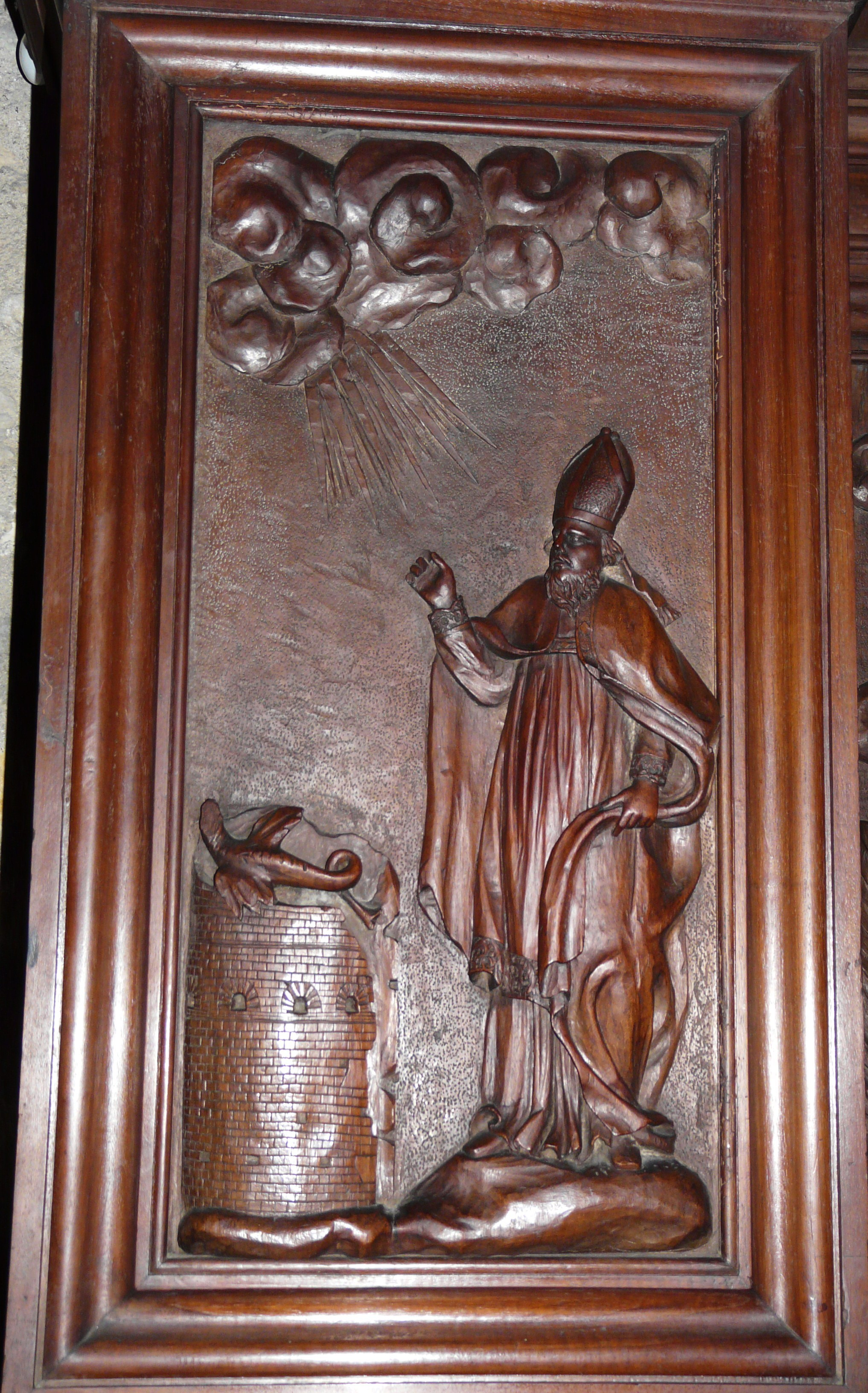 Panneau représentant saint Front face au dragon de la tour de Vésone, retable de l'église Saint-Étienne-de-la-Cité, Périgueux, Dordogne, France.